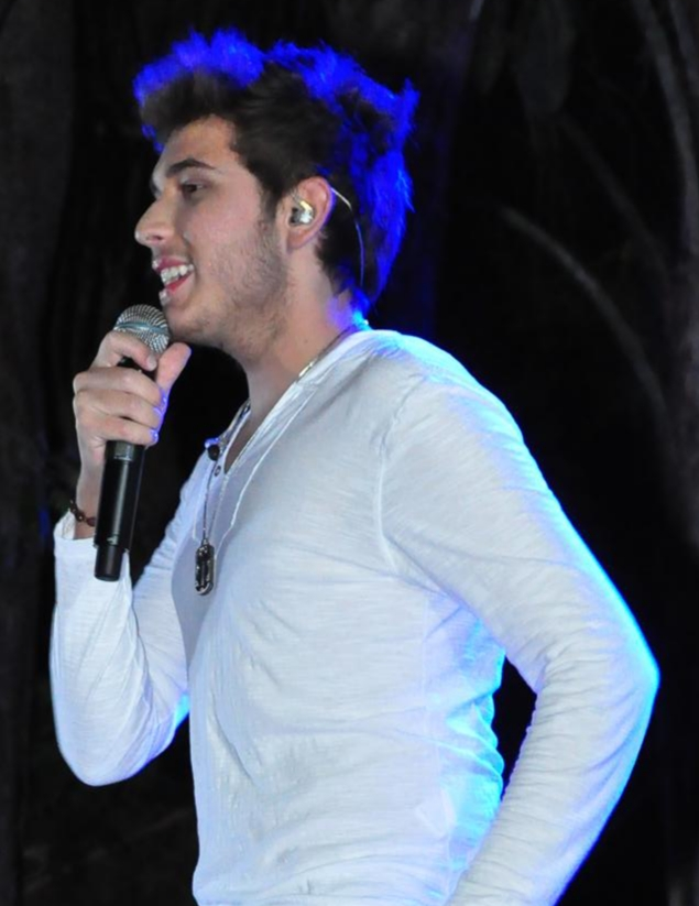 Festa da Virada Show Gustavo Mioto 30-12-12 (18) Foto: André Luiz D. Takahashi